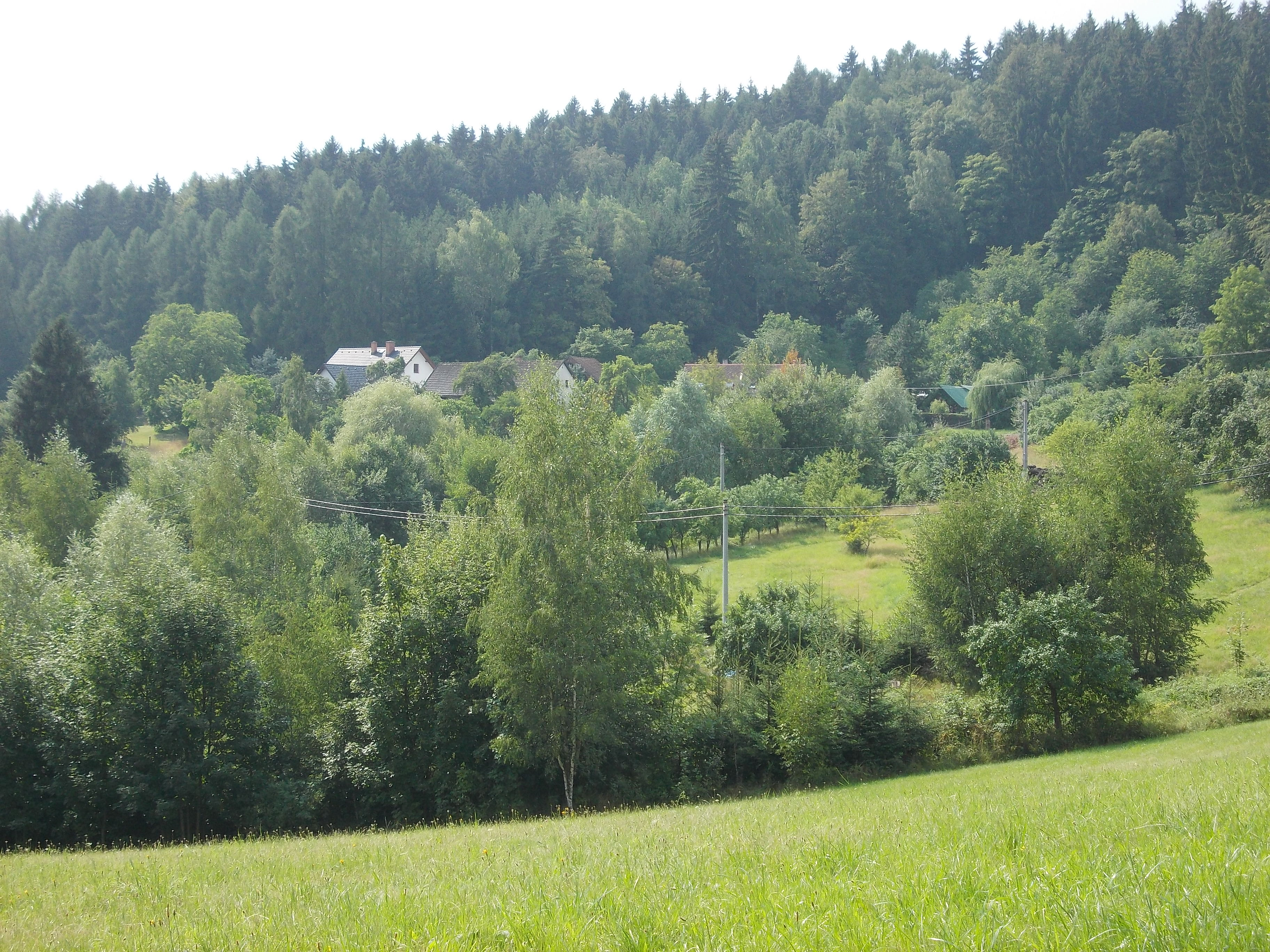 Zlámaniny - celkový pohled od východu